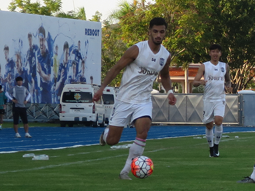 Mustafa Azadzoy